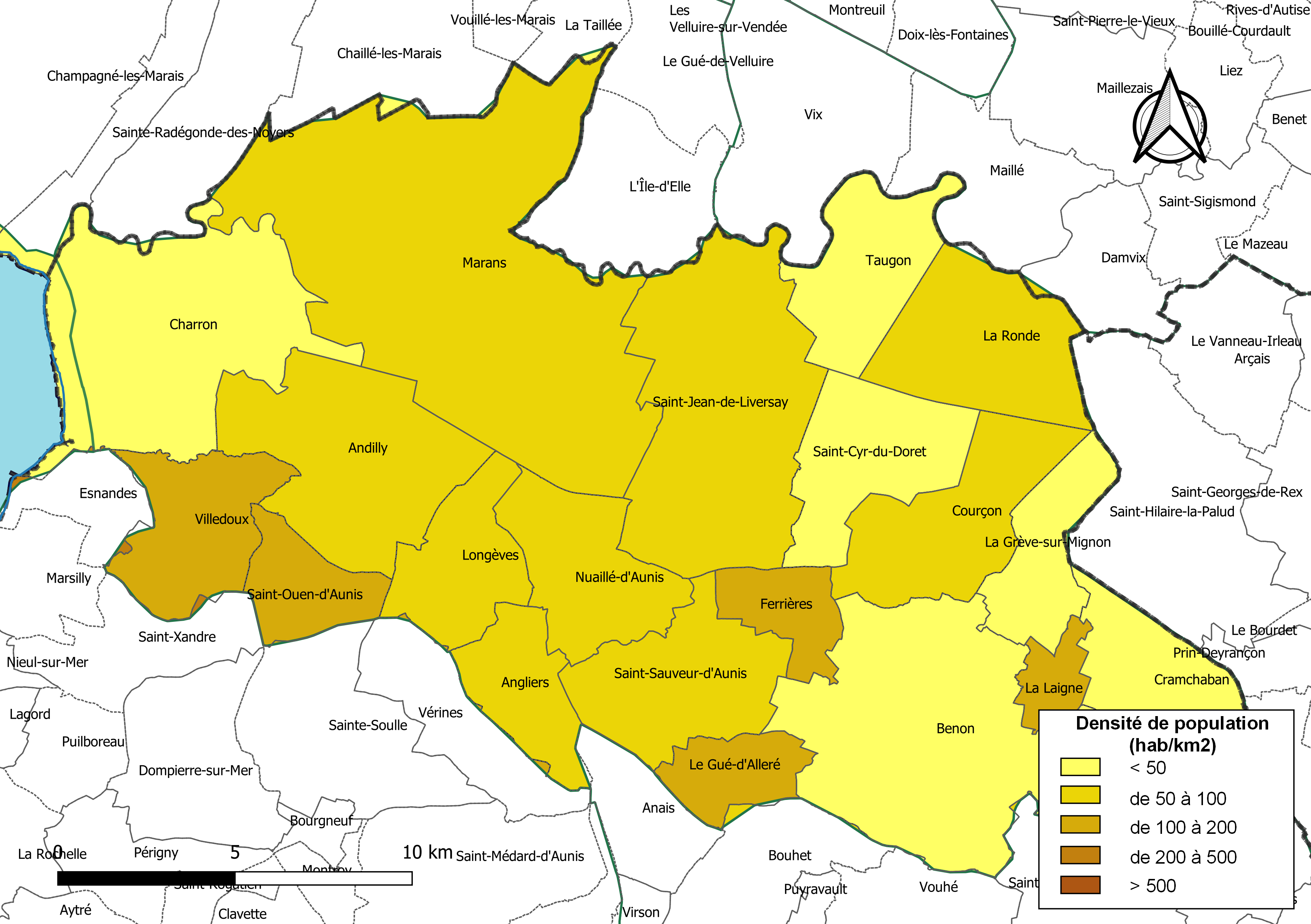 Carte des densités de population (millésimée 2016) des communes de la communauté de communes la Communauté de communes Aunis Atlantique, département de la Charente-Maritime, France. Composition au 1er janvier 2019.